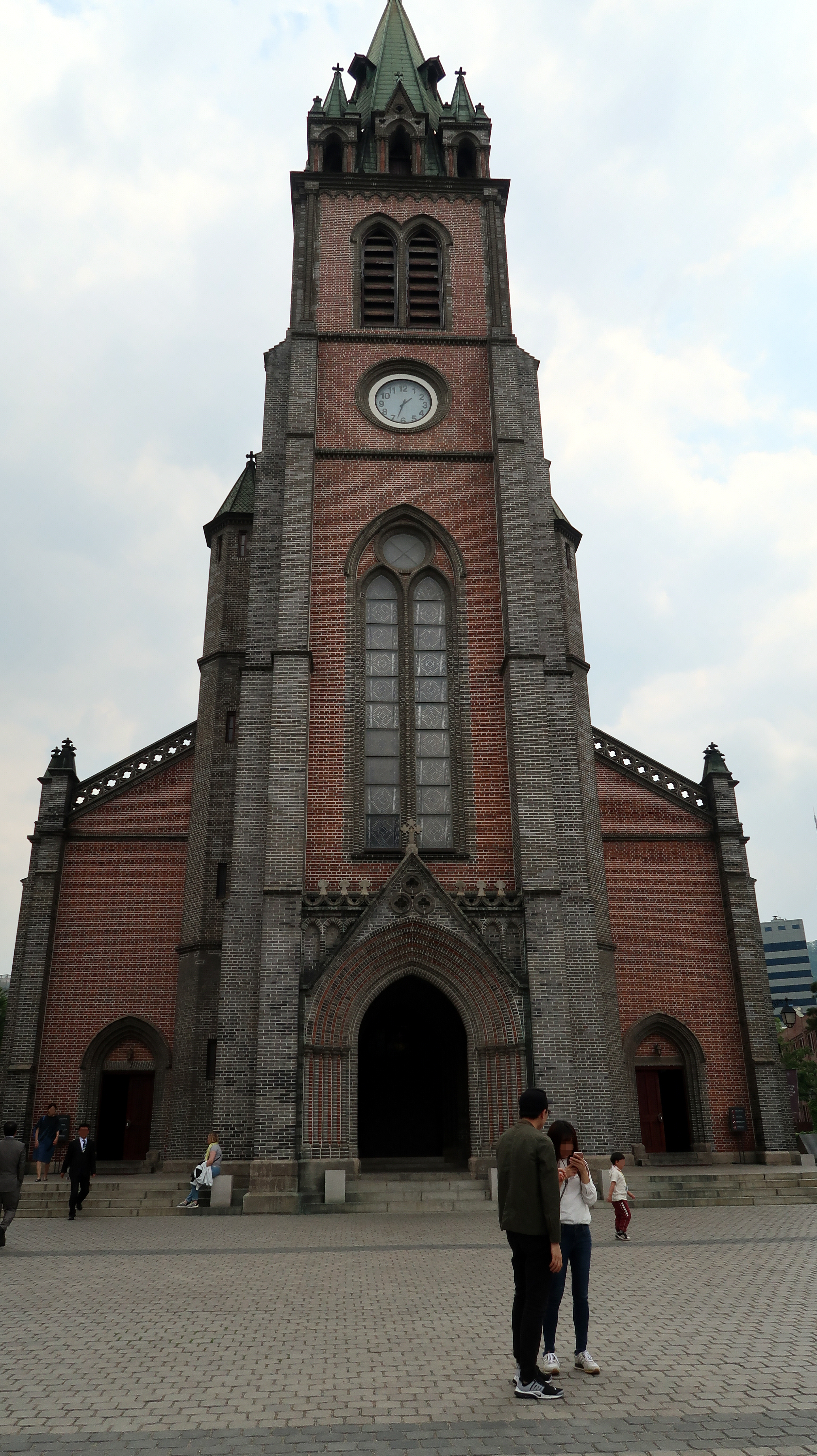 명동성당 (서울 중구 명동2가 1-8)